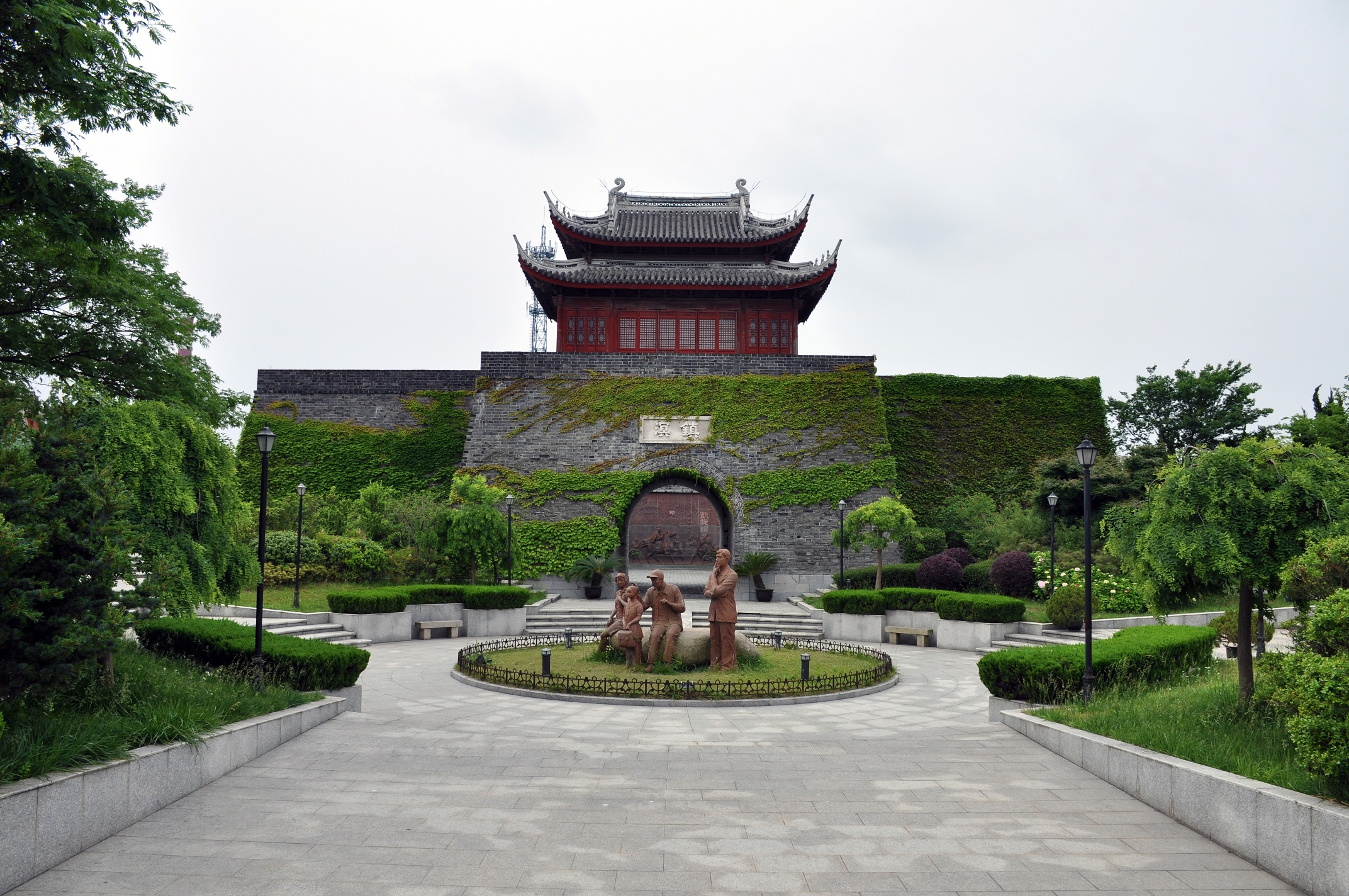 金山卫古城遗址 明 石化街道